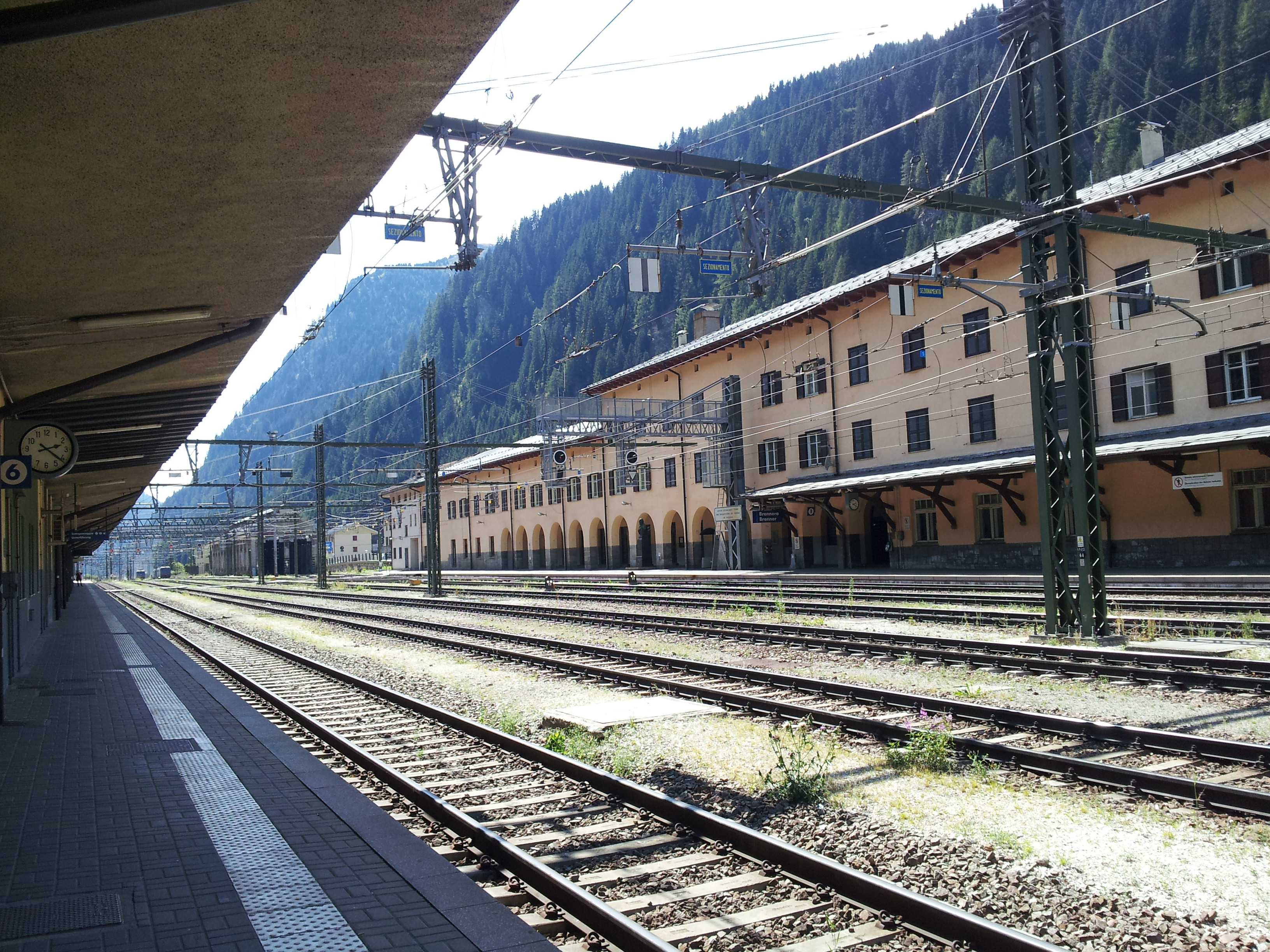 Bahnhof Brenner 20130830